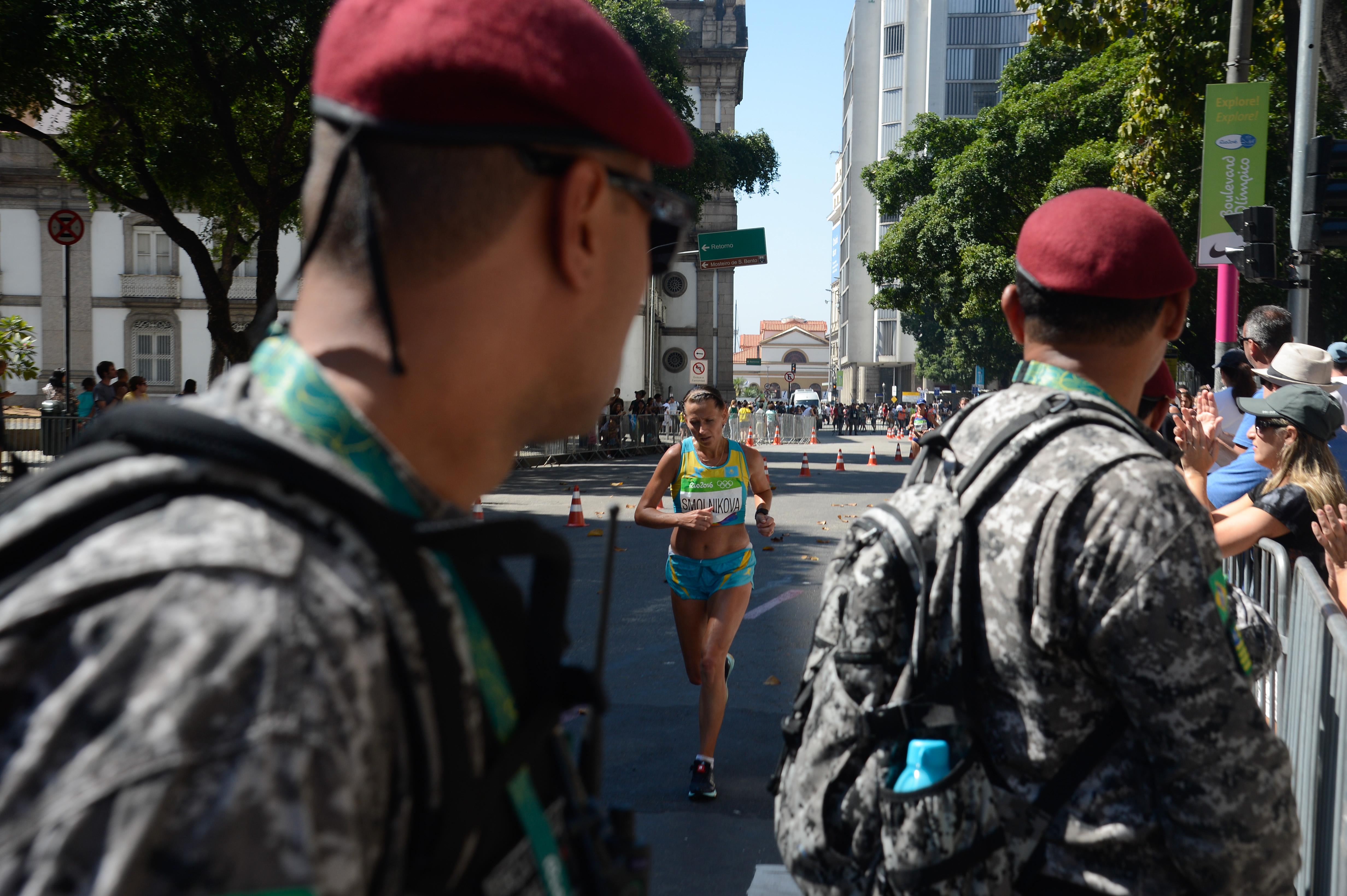 Rio de Janeiro - A Maratona Feminina Olímpica, que passa pelas ruas da cidade, e o Boulevard Olímpico lotam a região central da cidade neste domingo. (Tânia Rêgo/Agência Brasil).